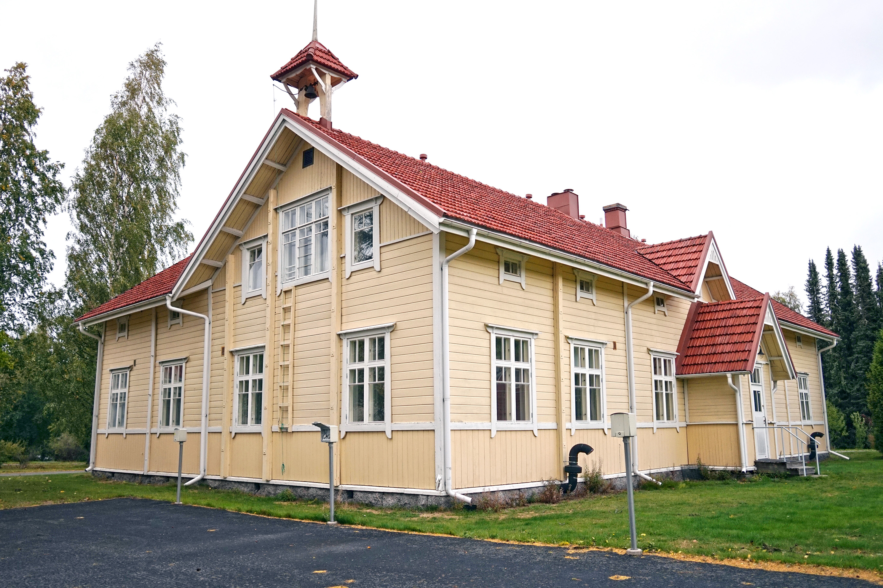 Tuomarniemen metsäoppilaitoksen kurssirakennus, ns. Vellikellorakennus This is a photo of a monument in Finland identified by the ID 'school building in Tuomarniemi Institute of Forestry' (Q55596000)